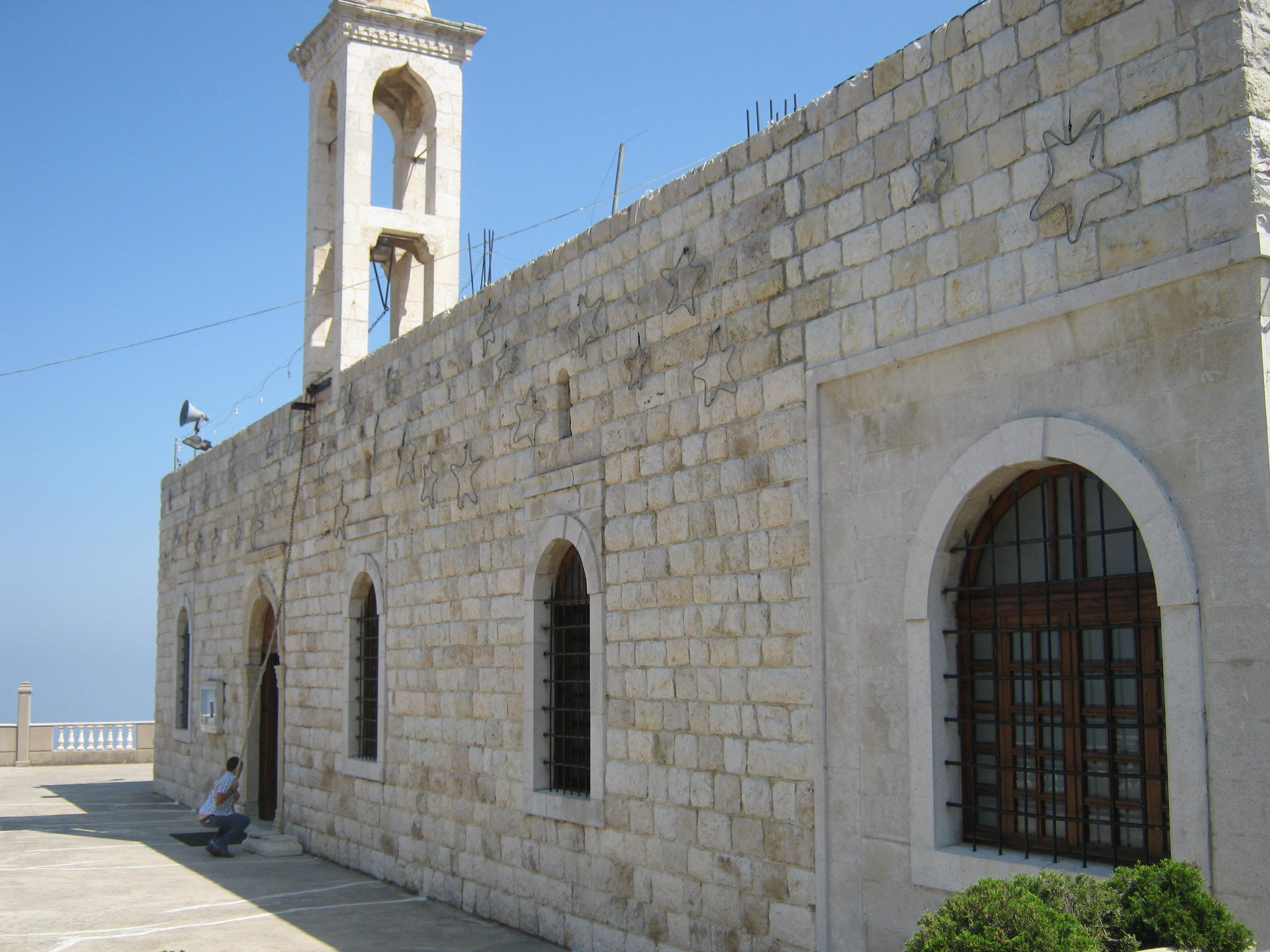 Église de saint Nicolas, Batha, Kesrouan, Lebanon